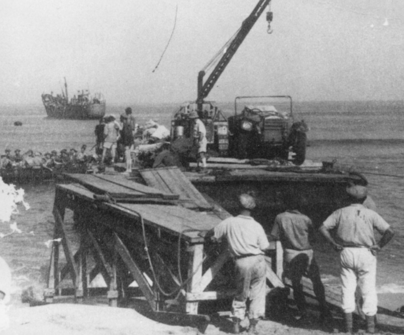 הנחתת כוחות מהאנייה חנה סנש בחוף נהריה כסיוע למבצע בן עמי